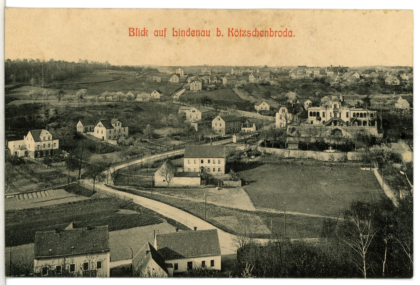 Radebeul; Blick auf Lindenau This postcard is from publisher Brück & Sohn in Meißen ( postcard has a unique number 13445 and is available in a higher resolution at the publisher. This images was uploaded in a cooperation project between Wikipedians and the publisher.